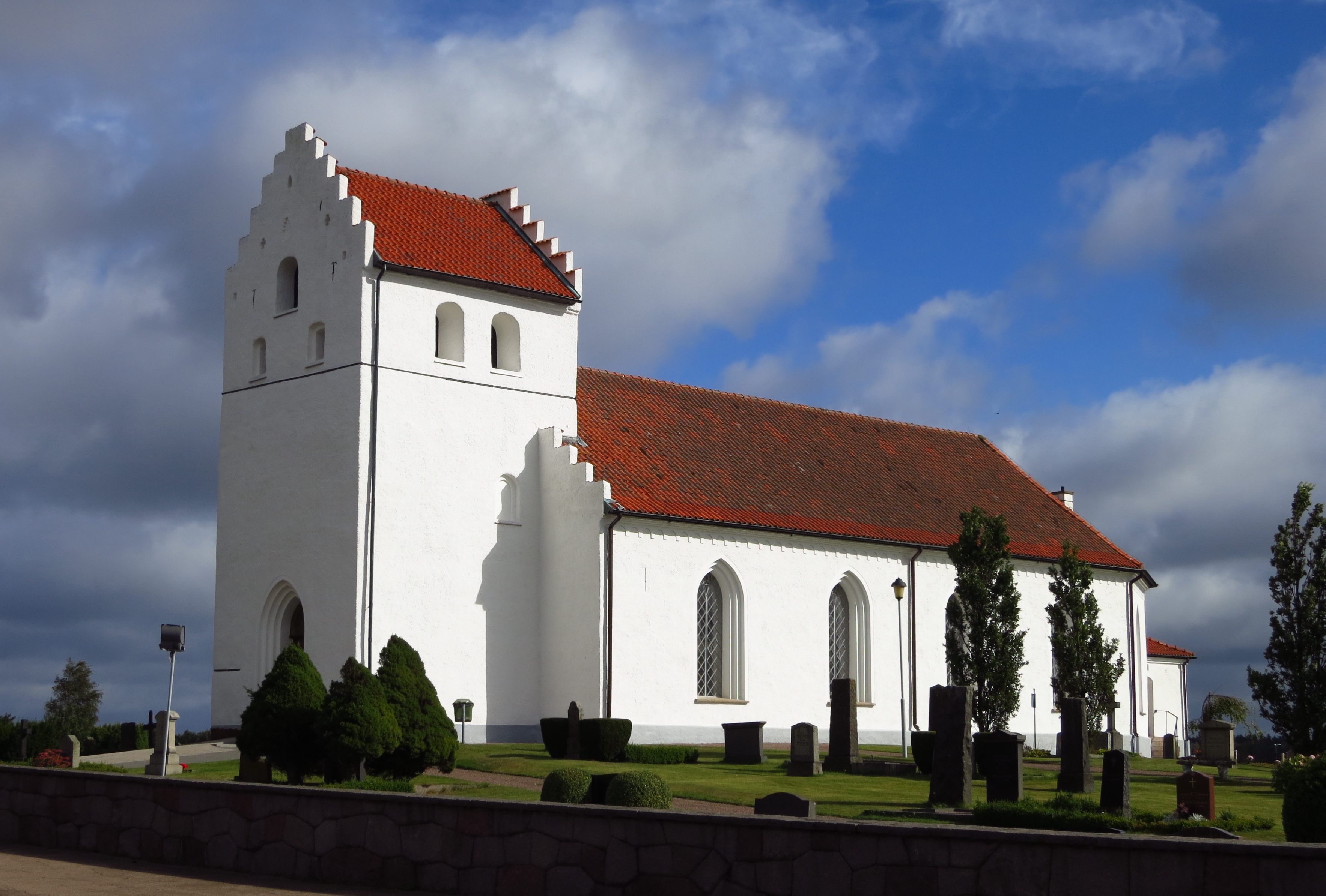 Ekeby kyrka, september 2012